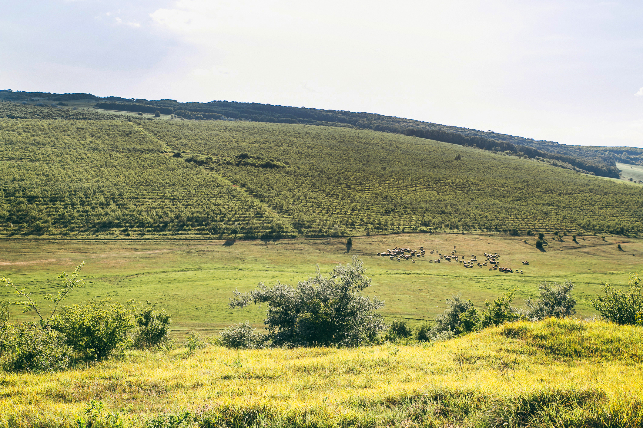 Izvoare – Risipeni, monument al naturii amplasat în raionul Fălești, între satele Izvoare și Risipeni, ocolul silvic Fălești, Risipeni, parcelele 72, 73, 75, 76; Caiuceni – Nagornoe, parcelele 30-33, 36-38; Izvoare, parcelele 61-69 (cod MD-FL-rp-022)